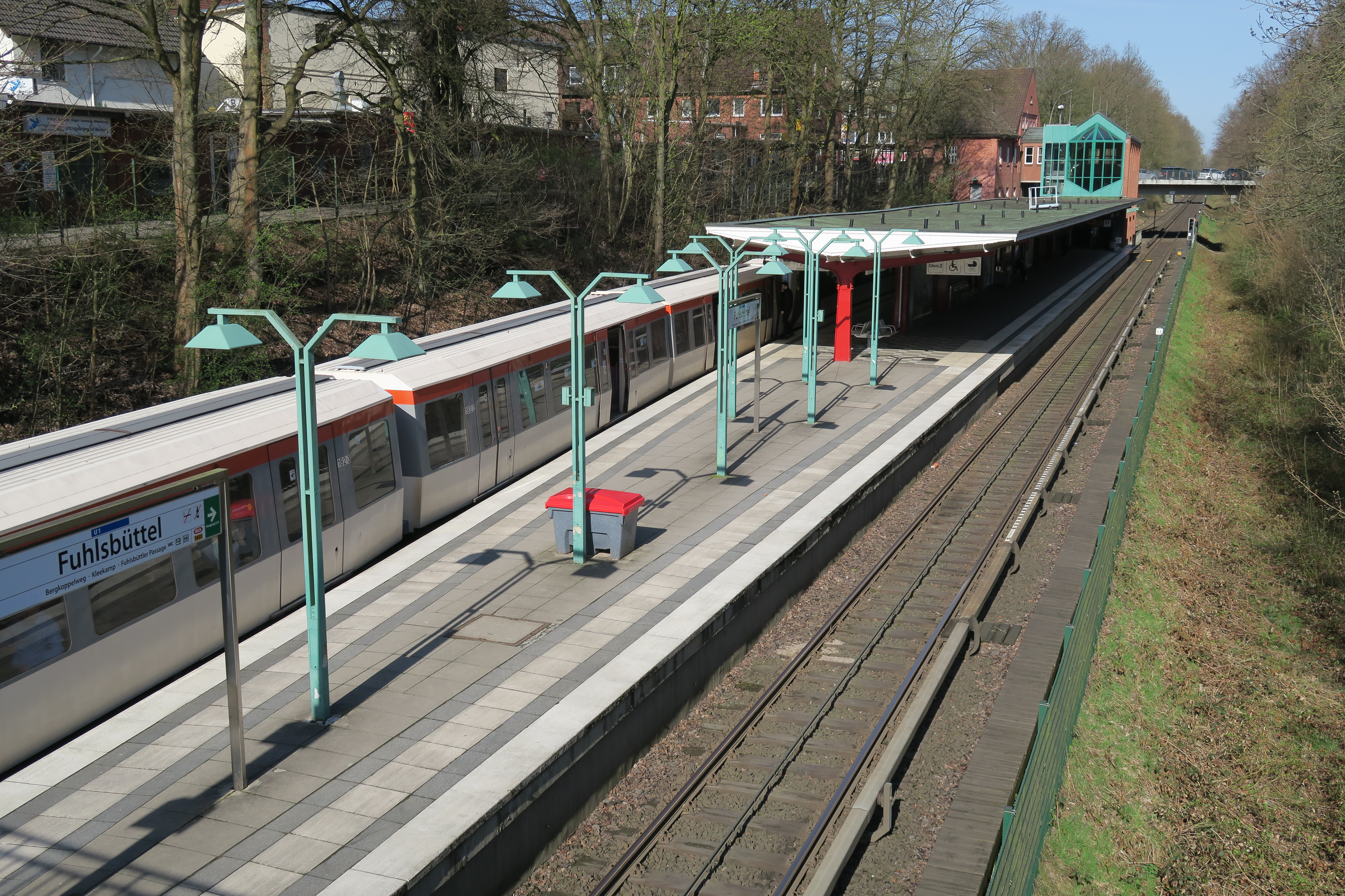 U-Bahnhof Fuhlsbüttel, Blick von der Hummelbütteler Landstraße